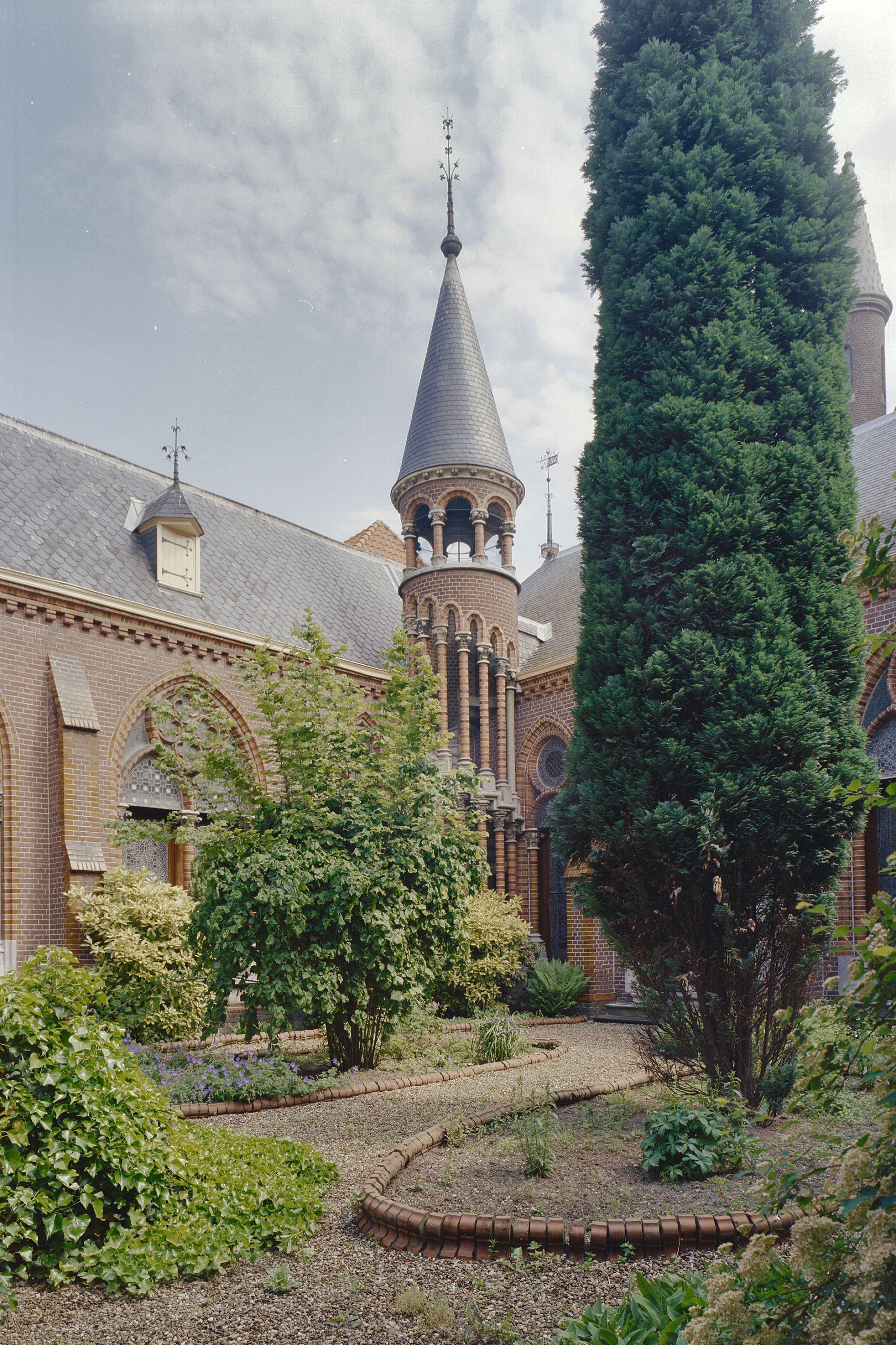 Mariapark: Binnenhoek met opengewekte traptoren